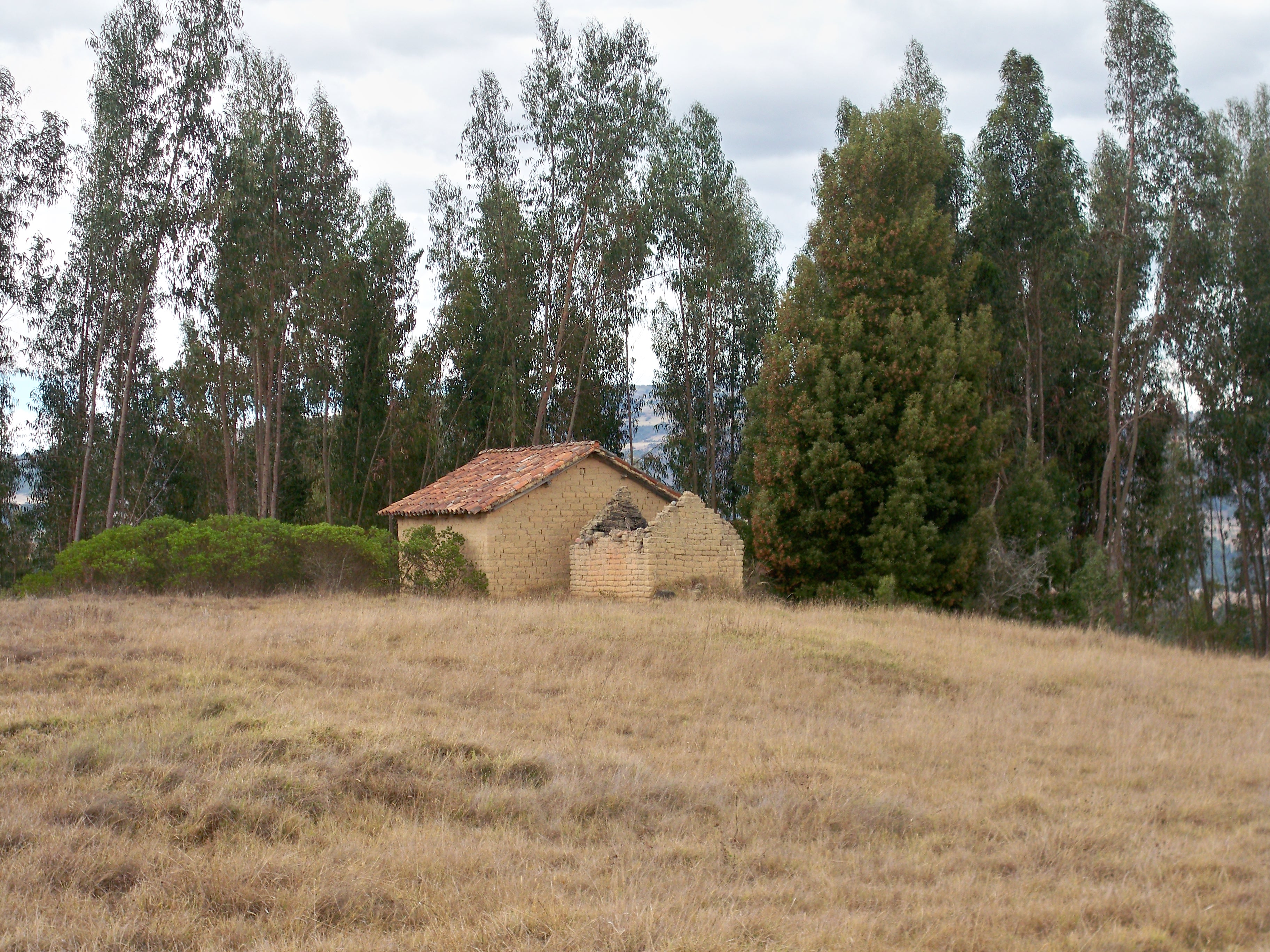 Abandono de casas en Oicatá